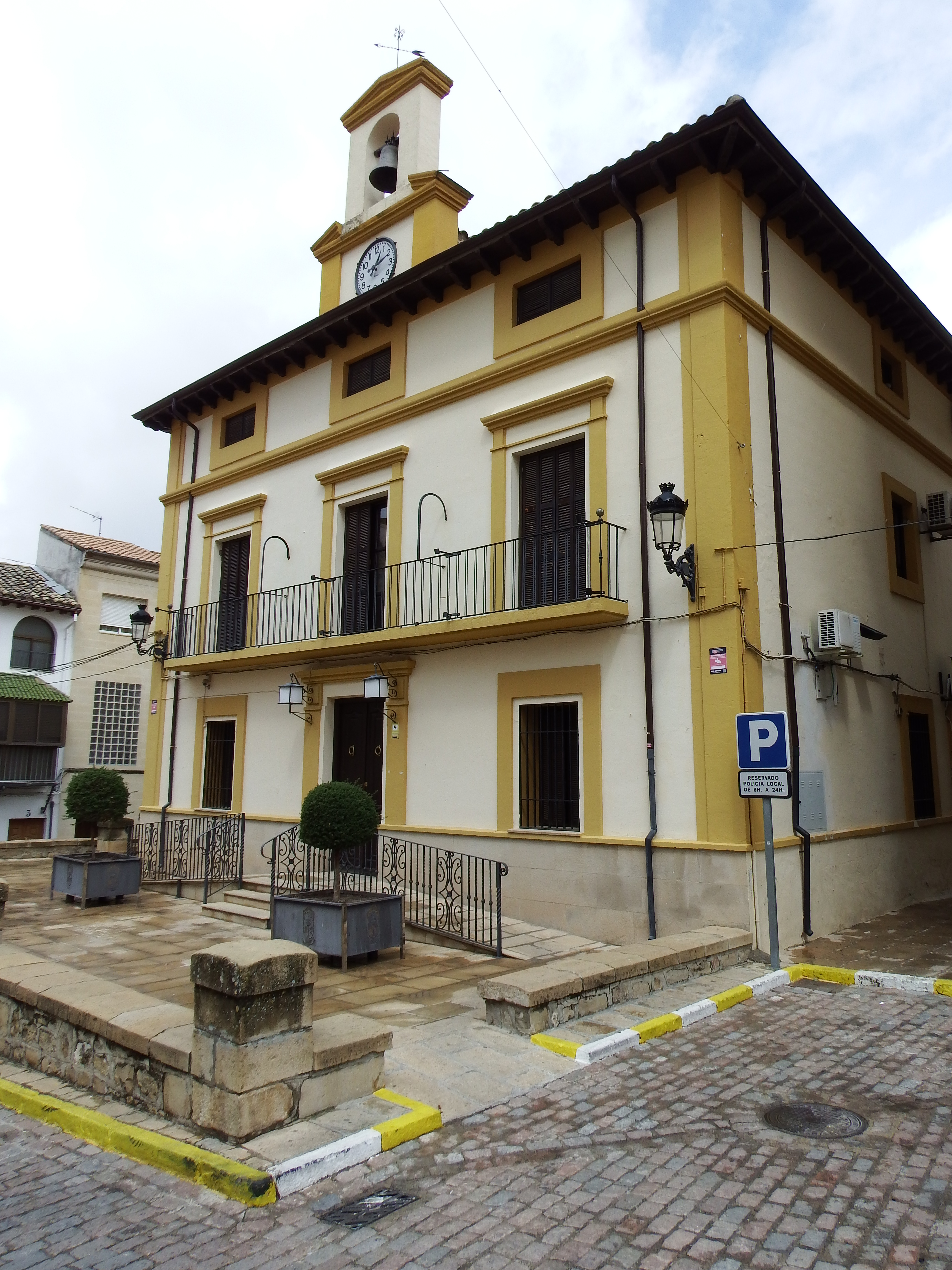 Ibros